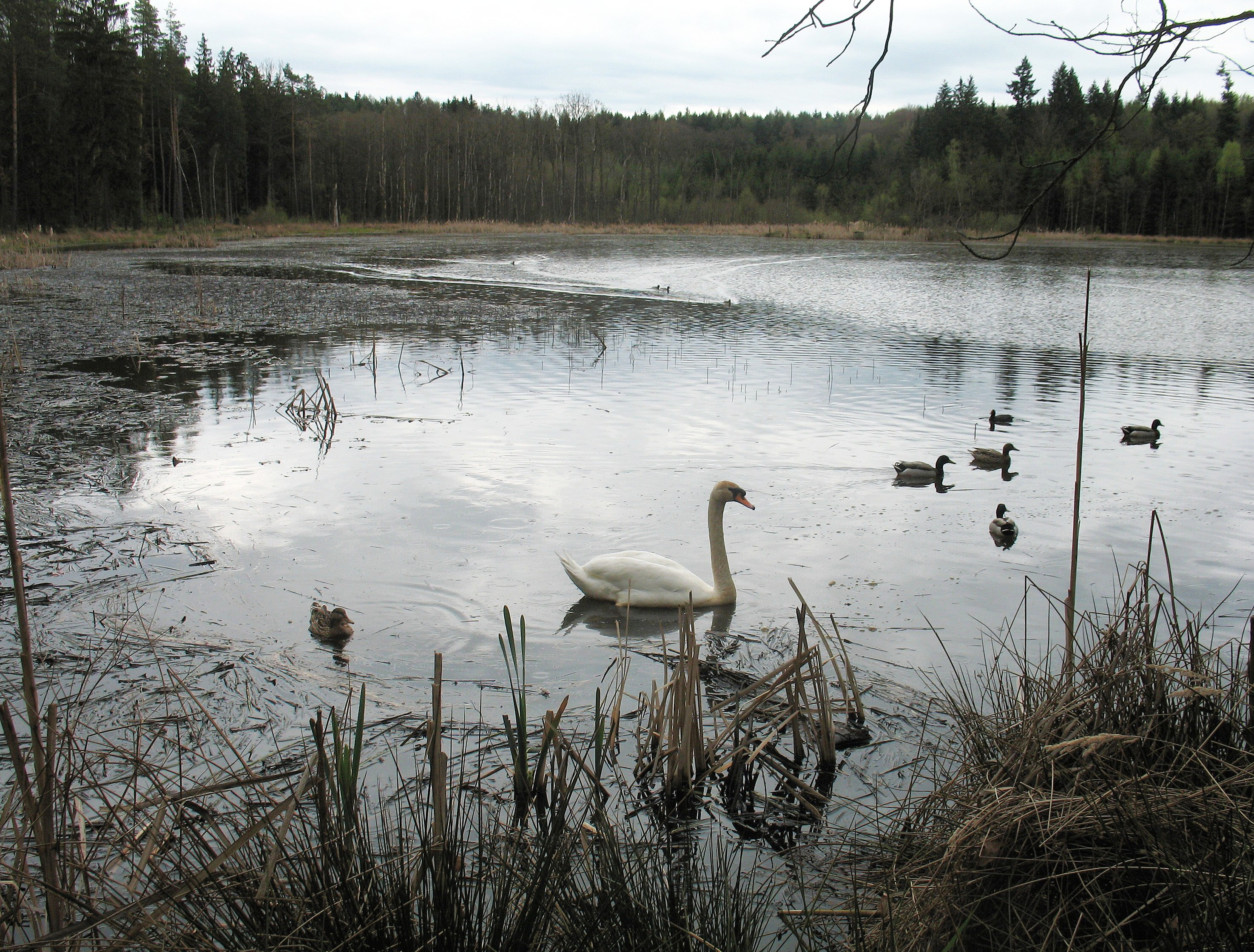 Vodní ptactvo